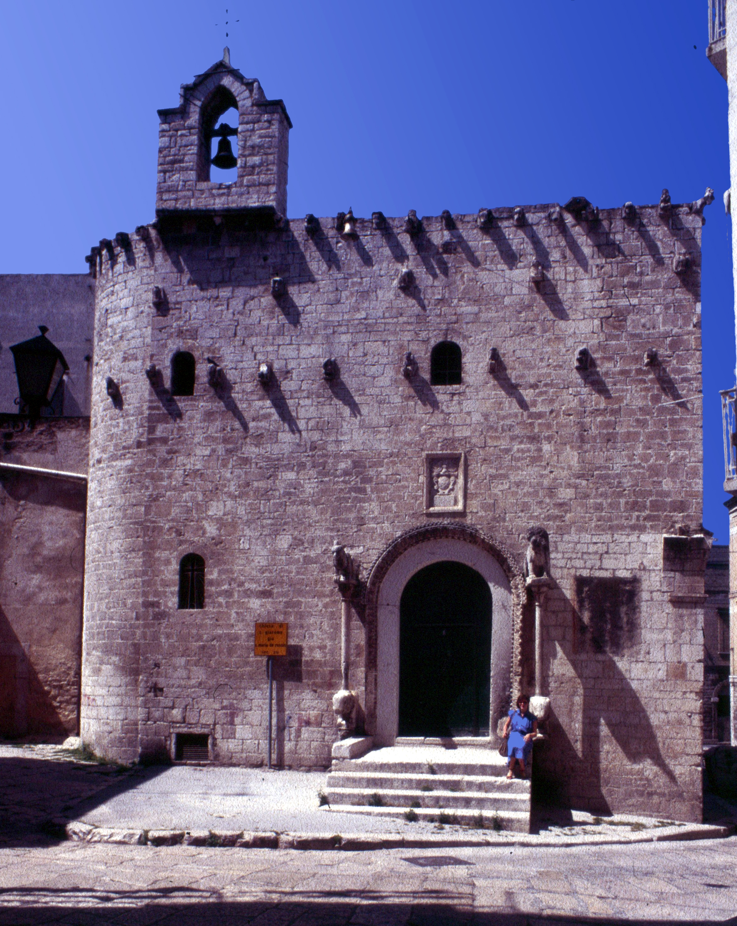 San Giacomo (Trani)